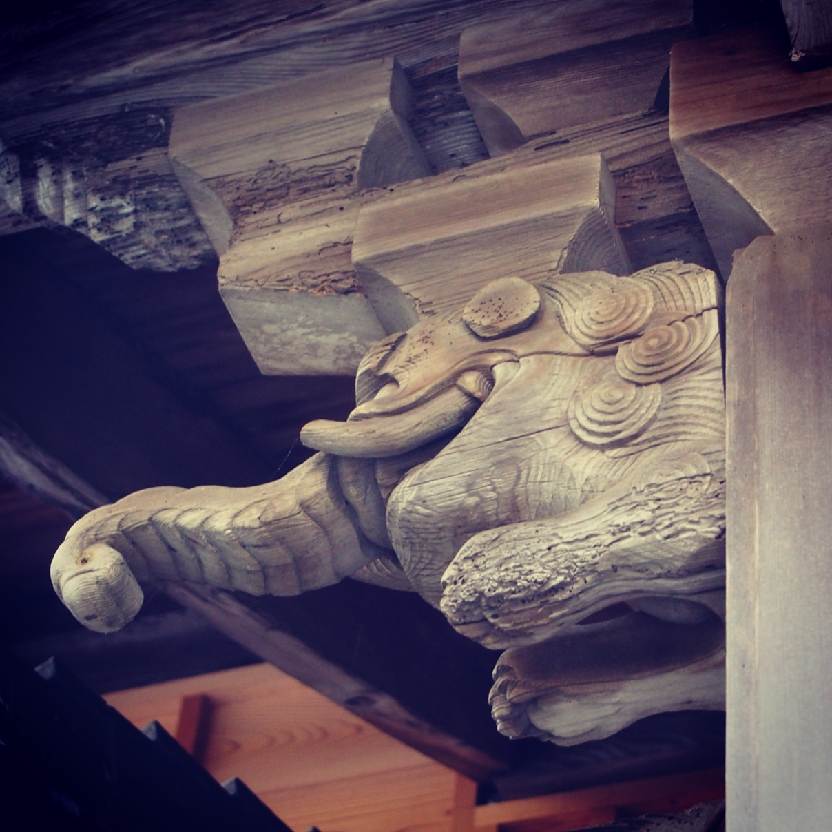 KihanaEnmeiji